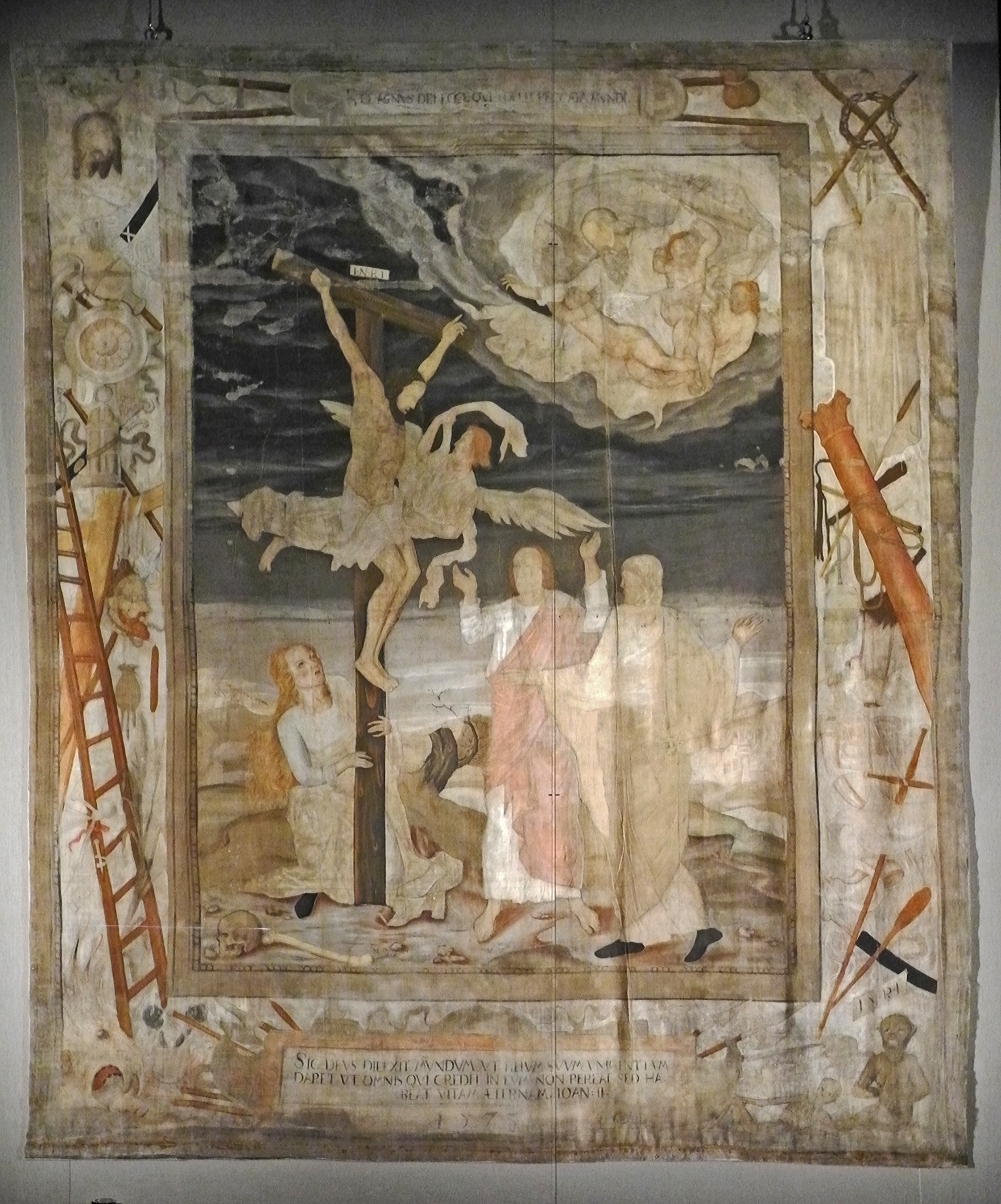 Kulturhistorisches Museum im ehem. Franziskanerkloster: Kleines Fastentuch